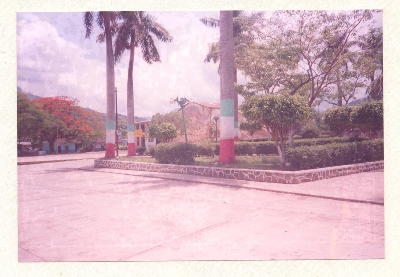 ESTA MUY BUENA ESTA FOTOGRAFIA